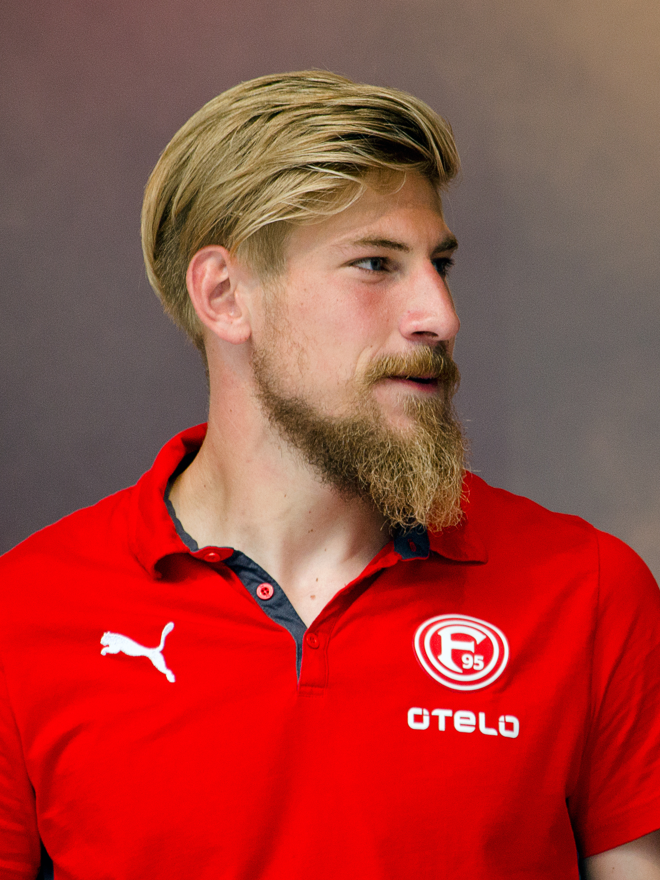 Lars Unnerstall, deutscher Fußballspieler